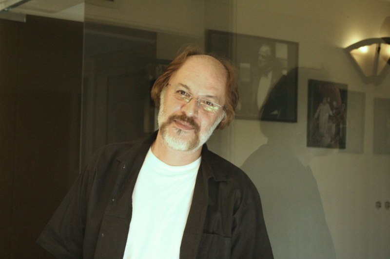 Amin Tarokh, Iranian actor.